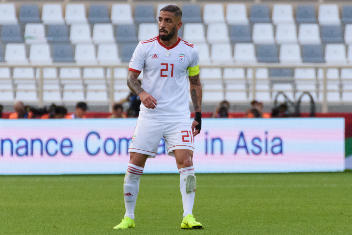 Ashkan Dejagah at the Asian Cup 2019